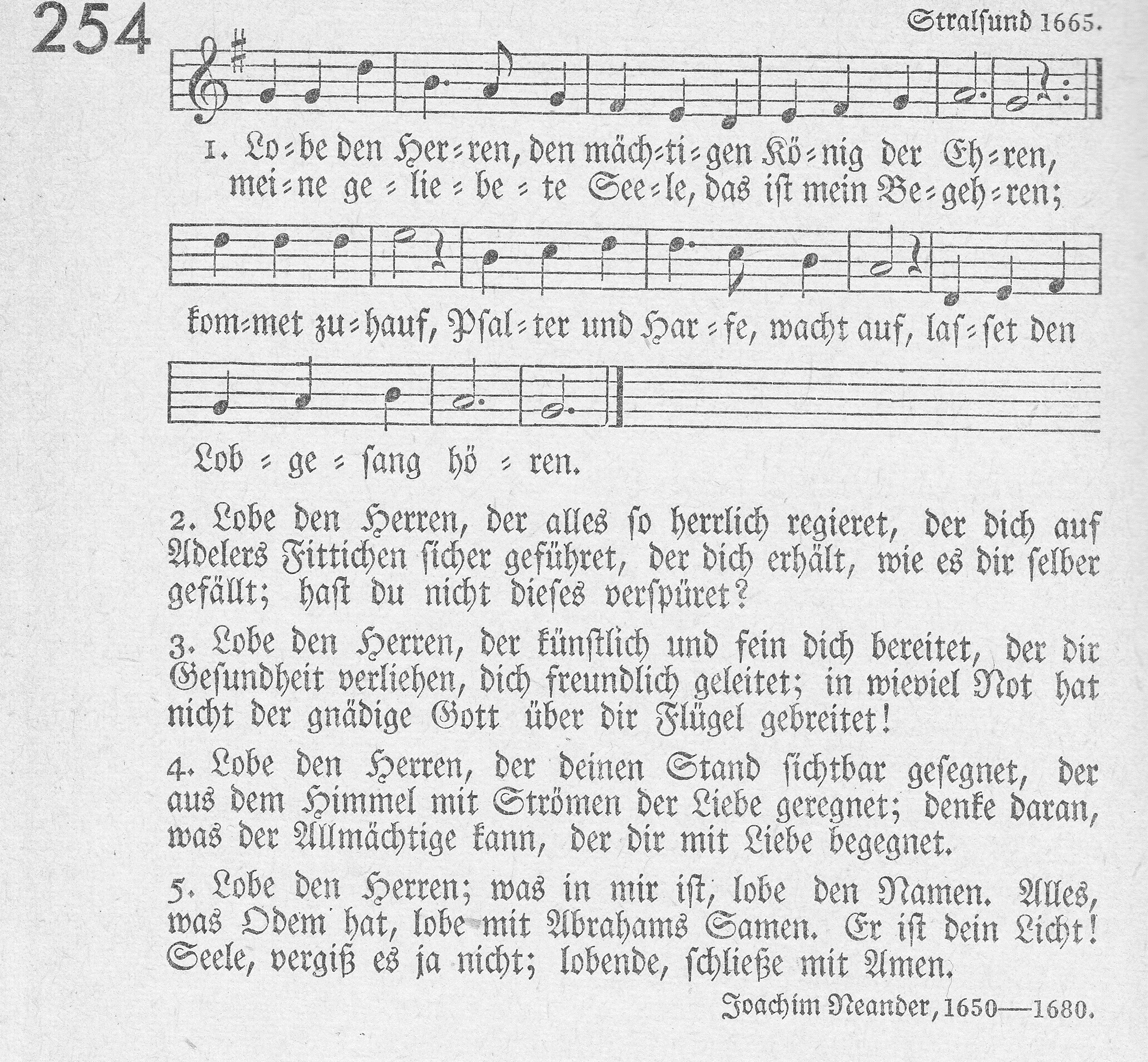 Scan des Liedes aus dem Evangelischen Gesangbuch für Rheinland und Westfalen, hrsg. von der Rheinischen und Westfälischen Synode, mit dem vom Deutschen Evangelischen Kirchenausschuss 1915 beschlossenen Stammteil (Lieder 1-342), gedruckt von Verlag W. Crüwell und in Dortmund 1929 erschienen.